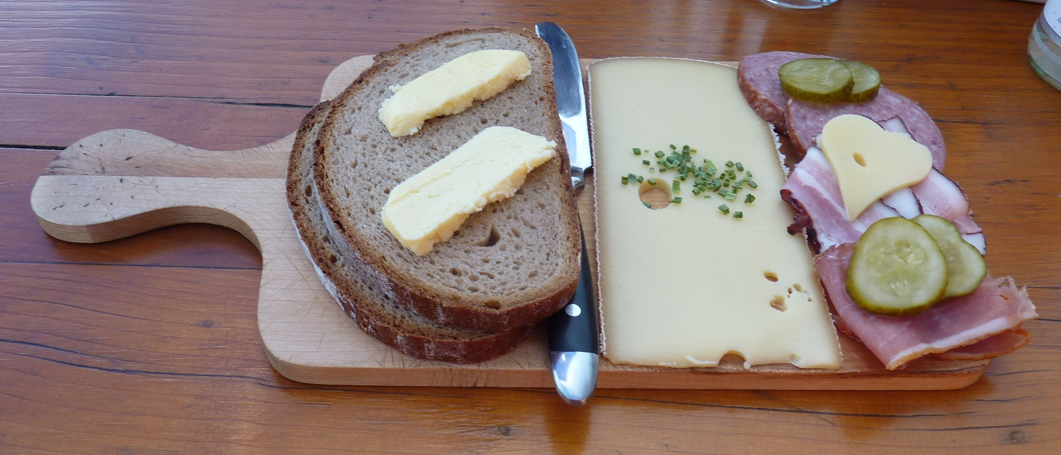 Brotzeit mit allem